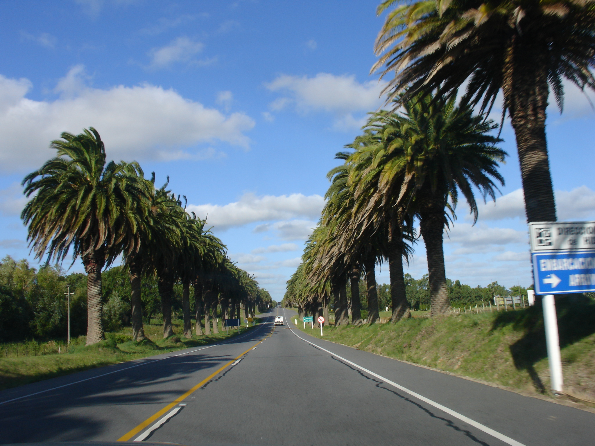 Uruguayan road to Montevideo.